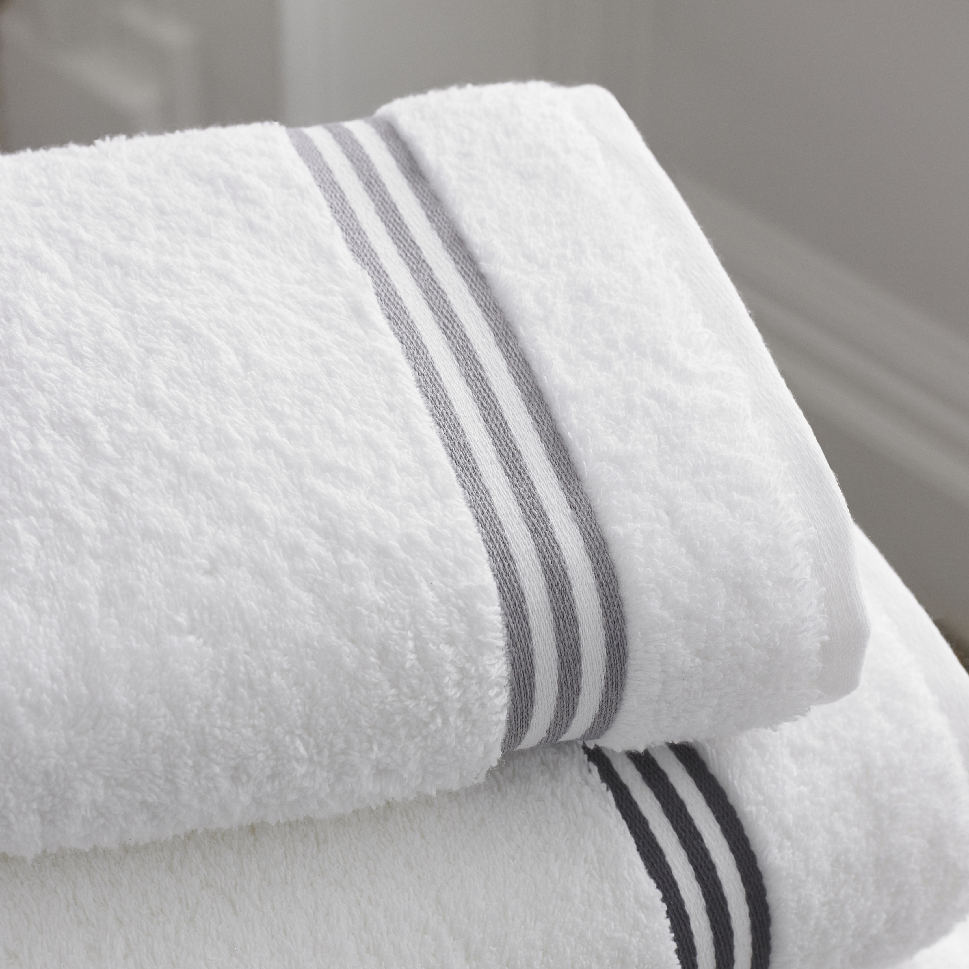 pixella15834